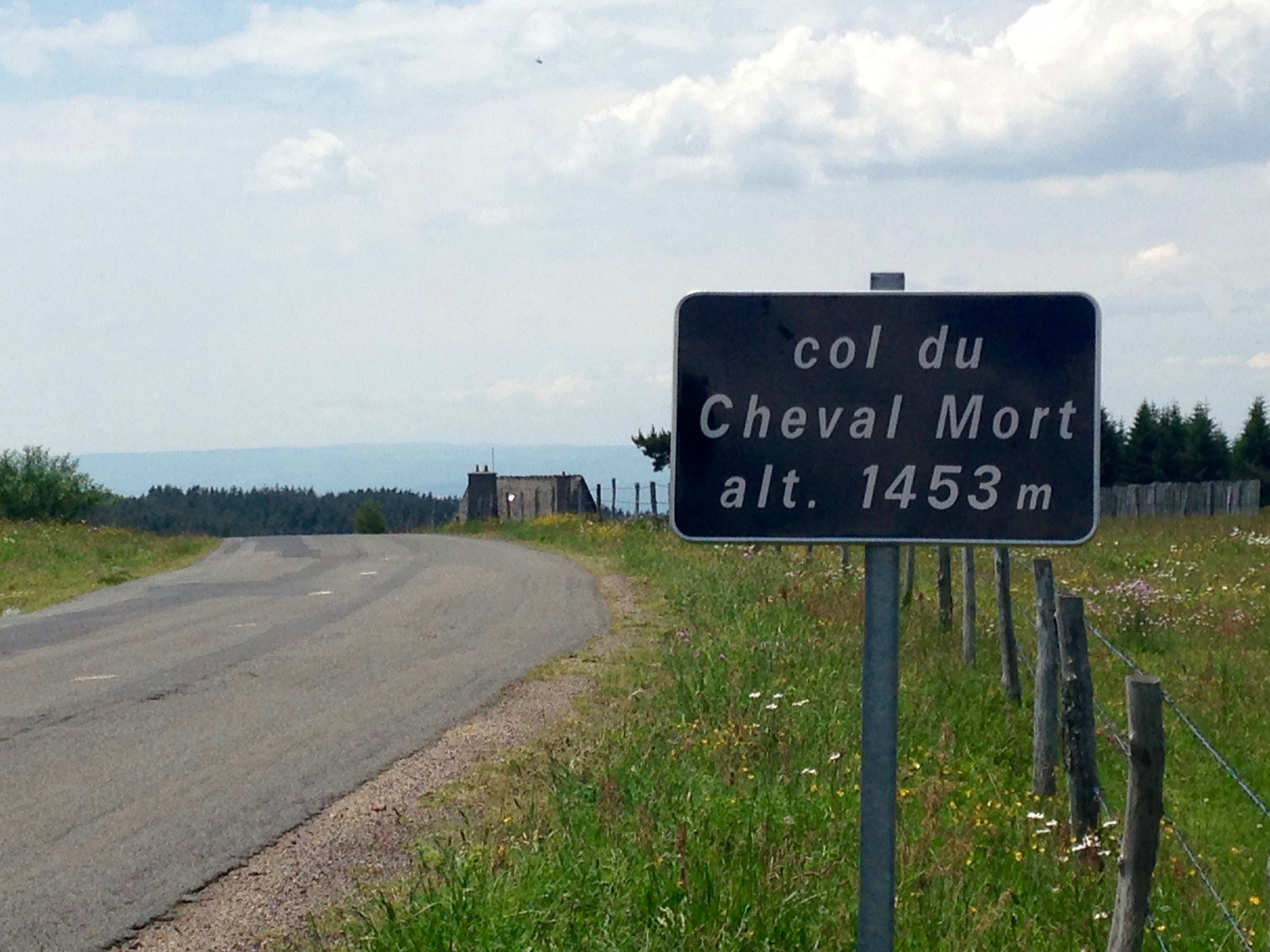 Panneau routier annonçant le col du Cheval Mort, avec la baraque du Cheval Mort en arrière plan.